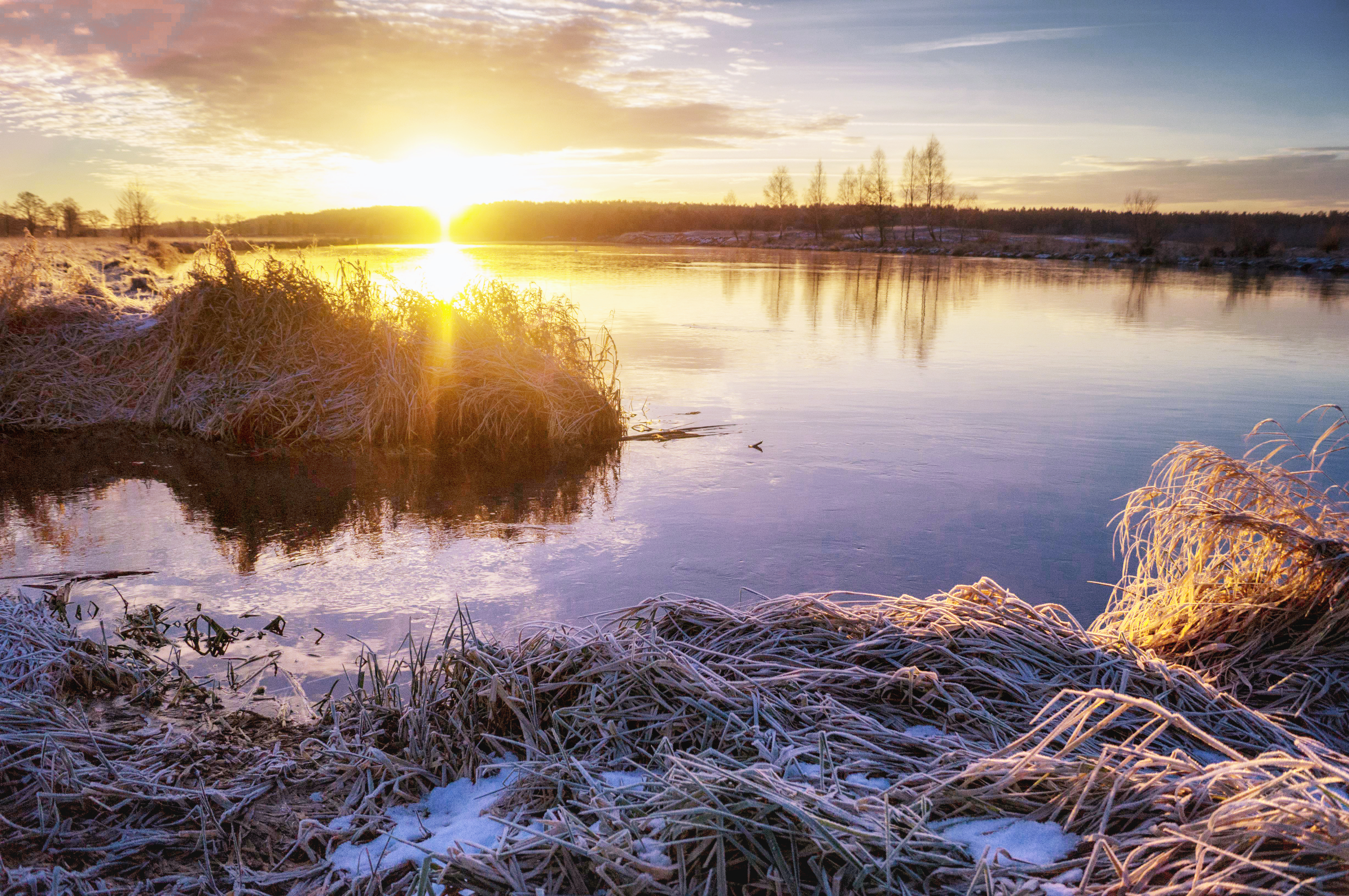 Вусце ракі Пела